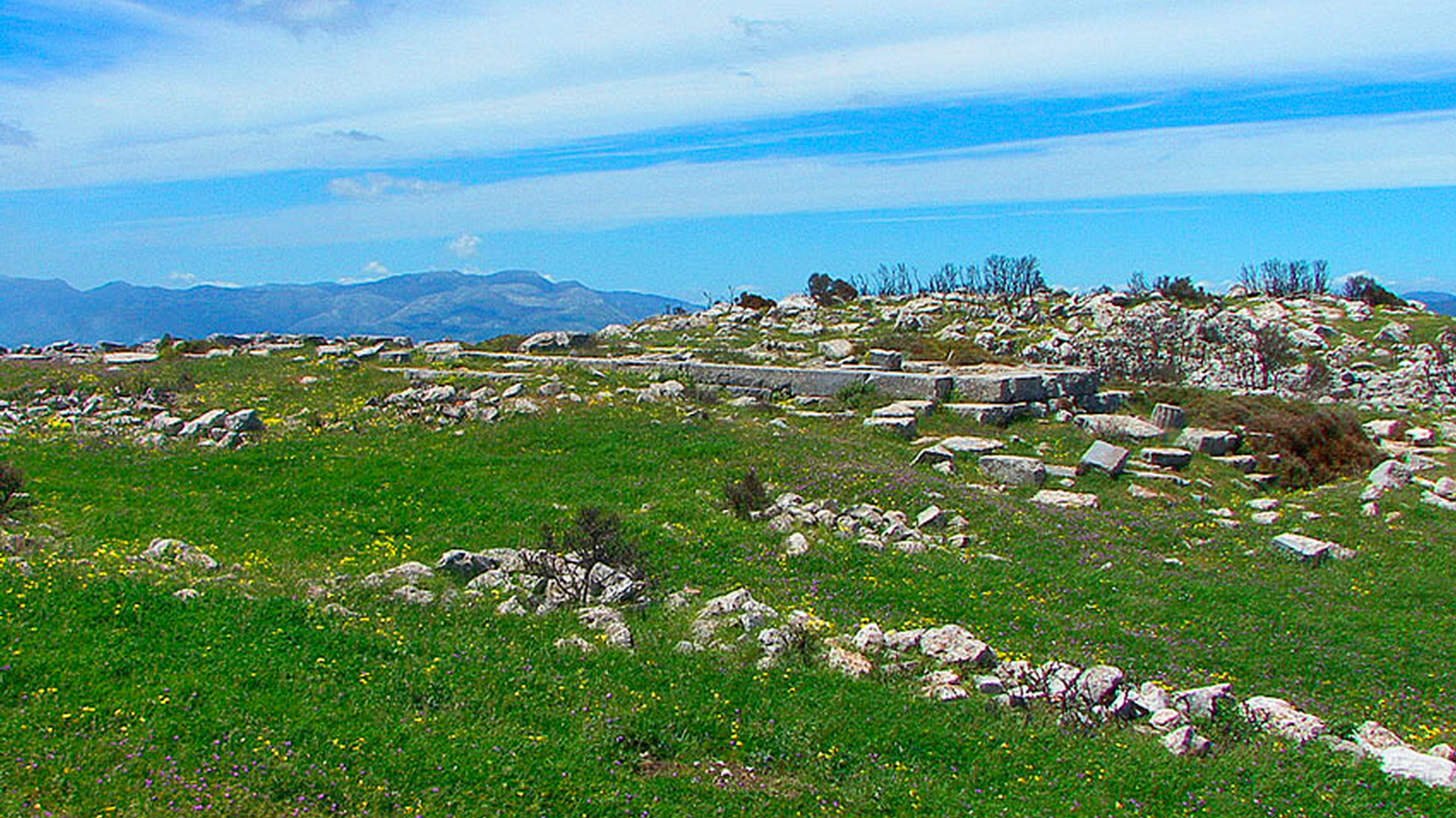 Το Ιερό του Ίππιου Ποσειδώνα στη Μαντινεία του Δήμου Τρίπολης